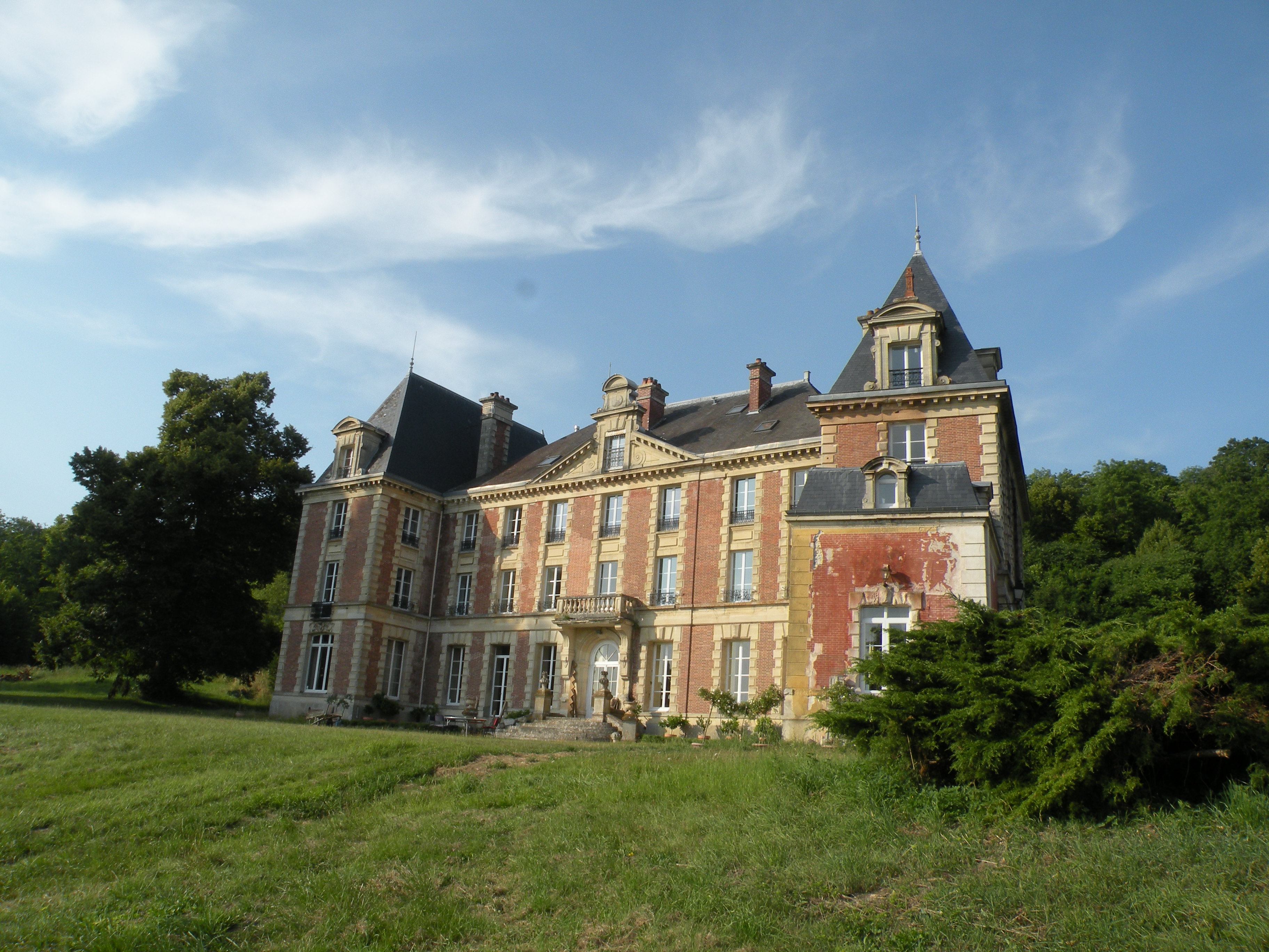 Château de la Bûcherie chateau